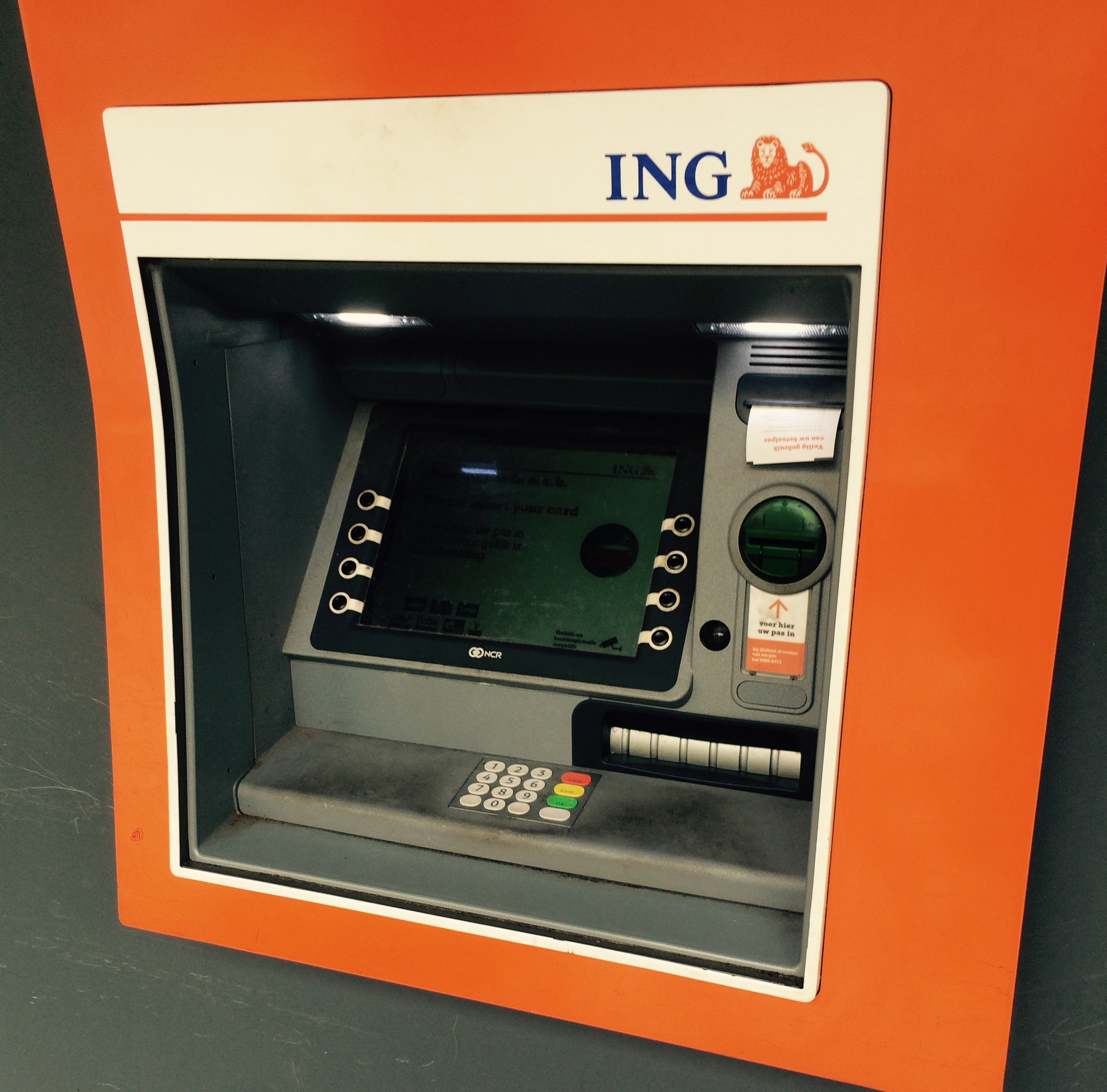 ing Geldautomat